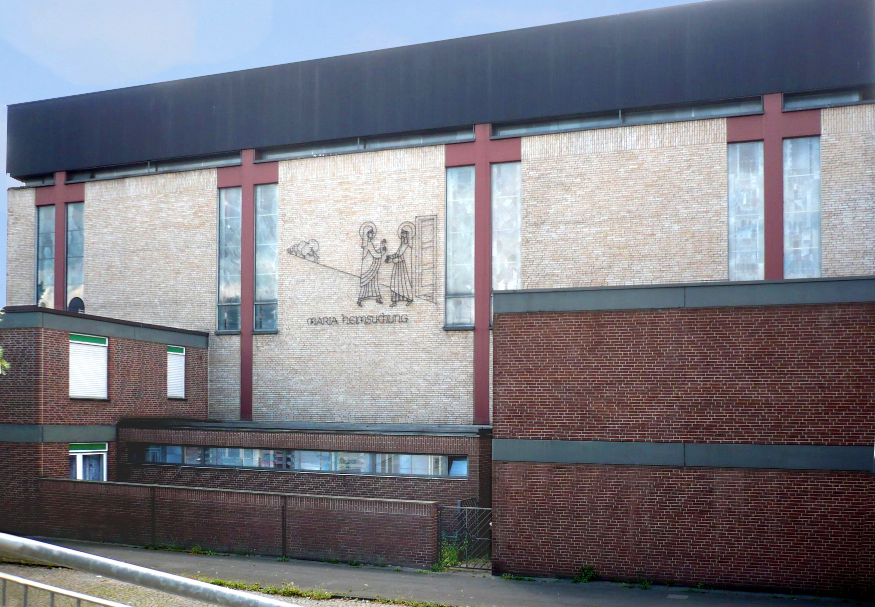 St. Maria Heimsuchung in Essen-Überruhr-Hinsel